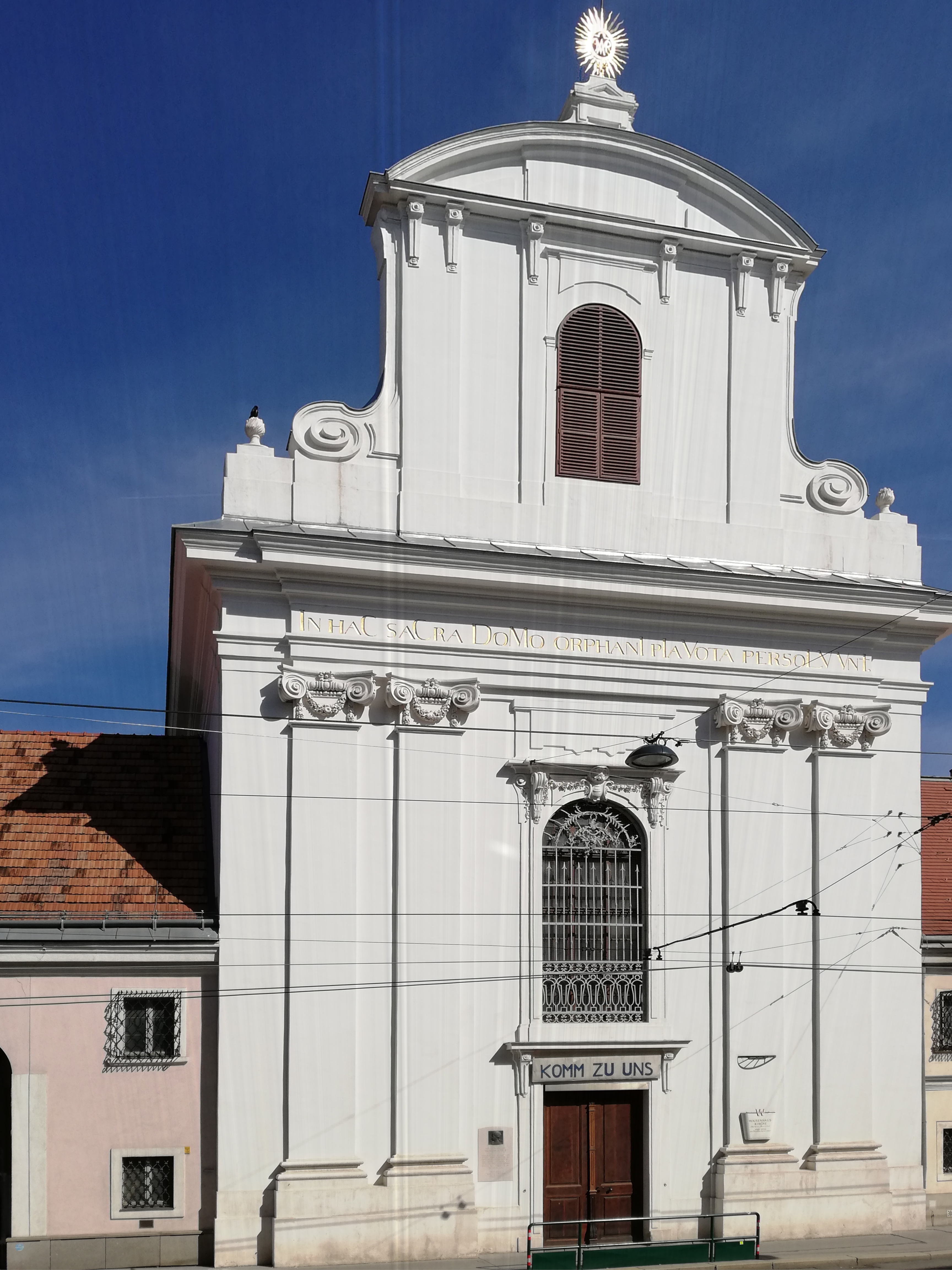 Frontansicht Waisenhauskirche Wien